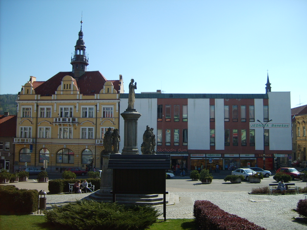 obchodní dům Jednota na náměstí ve Voticích.